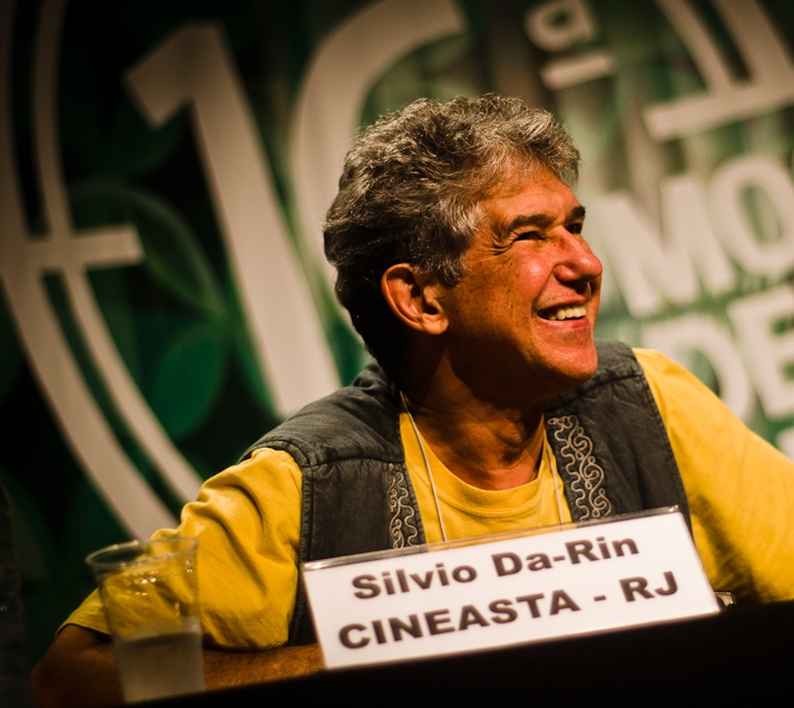 O cineasta brasileiro Sílvio Da-rin na Mostra do Cinema de Tiradentes, 2013.